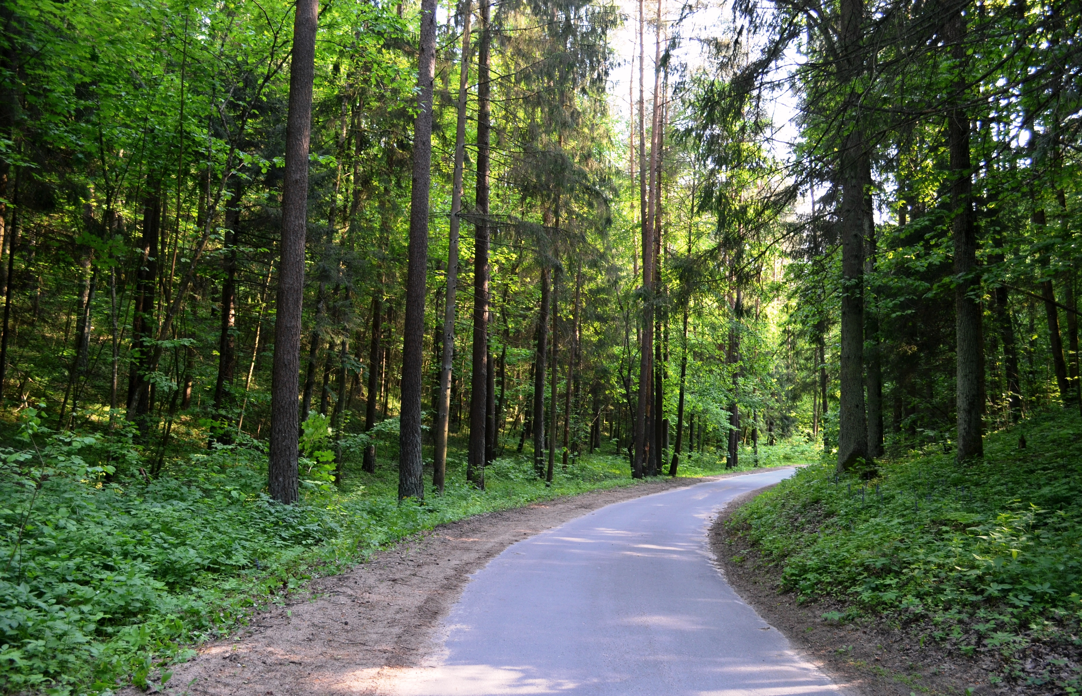 Panerių miškas ir Zuikių gatvė, Vilnius